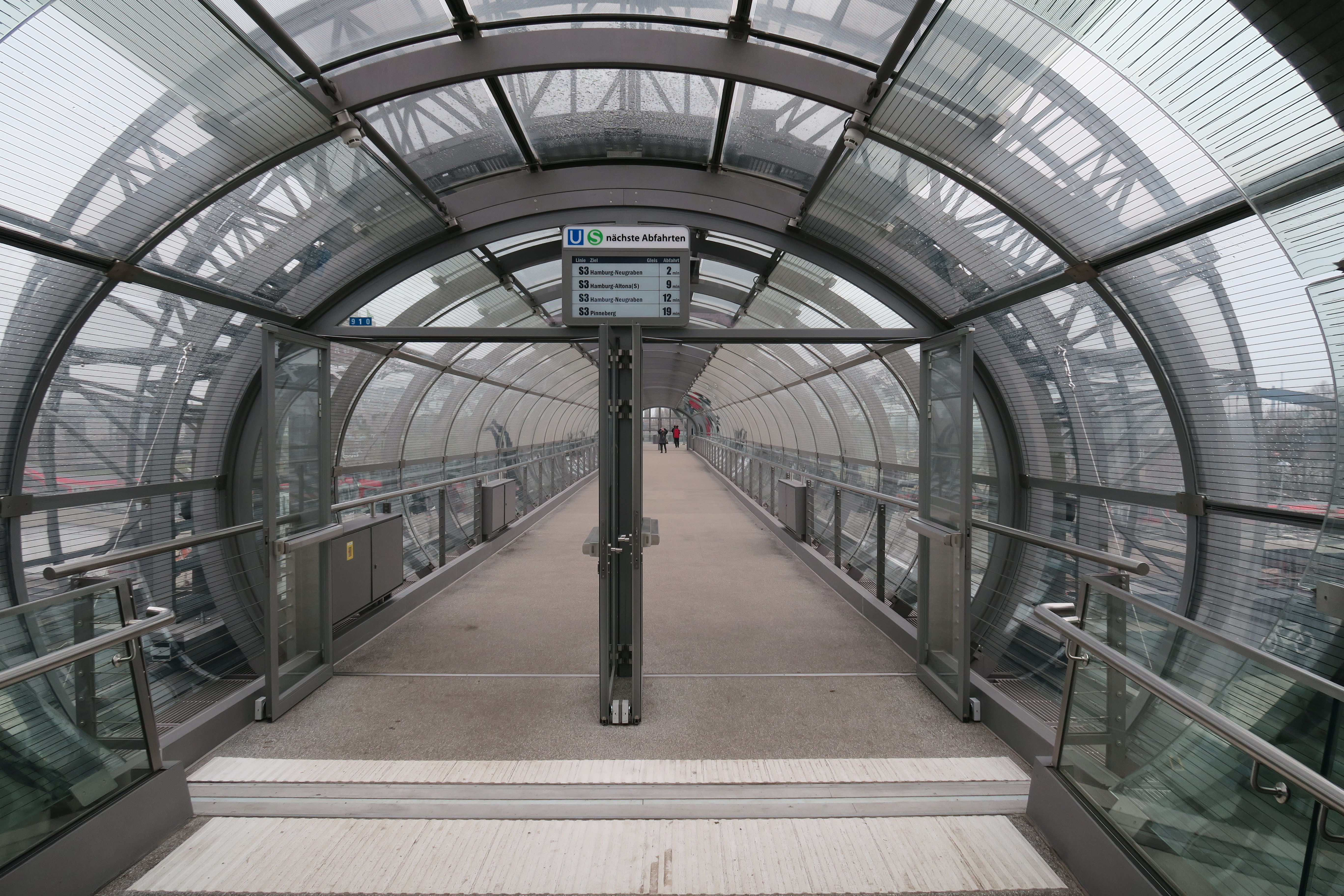 „Skywalk“ zwischen U-Bahnhof und S-Bahnhof Elbbrücken